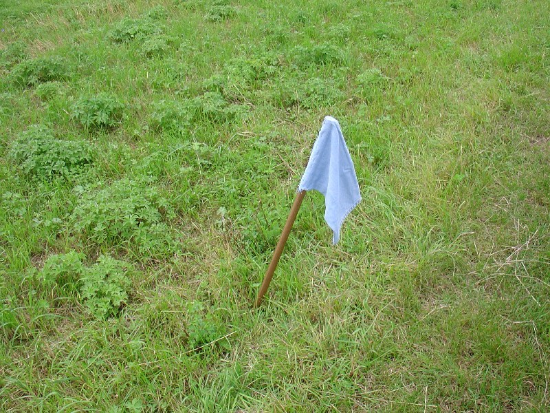 Capture the Flag, Fahne im Spiel